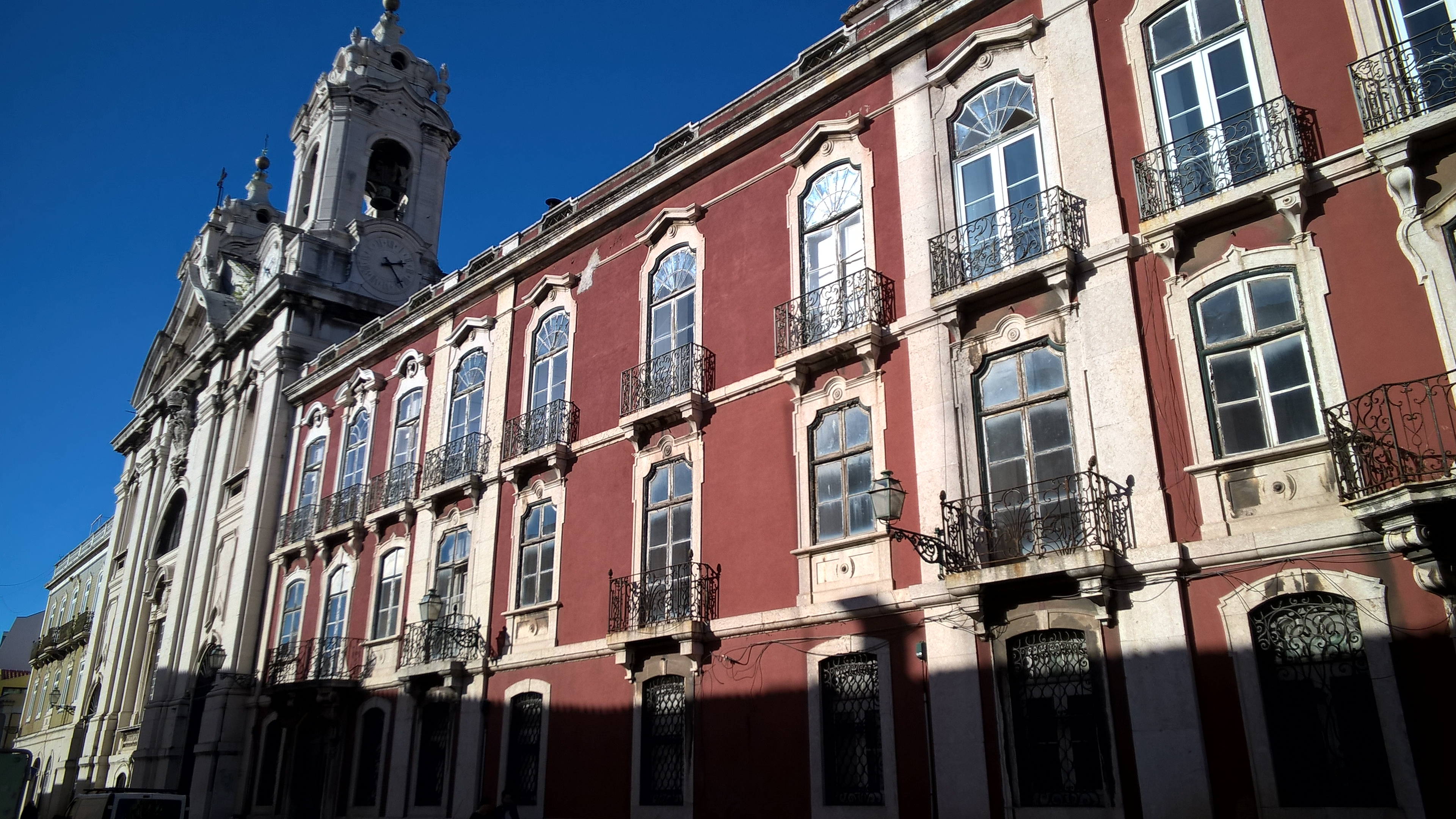 Igreja de São Francisco de Paula (Lisboa)